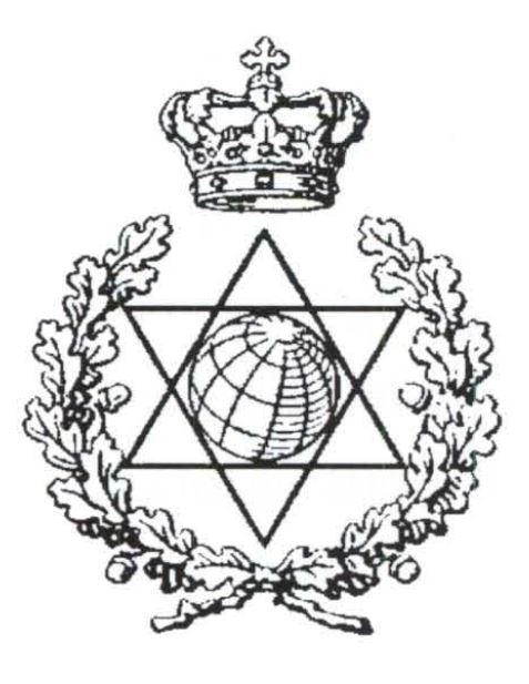 Geodætisk Instituts logo